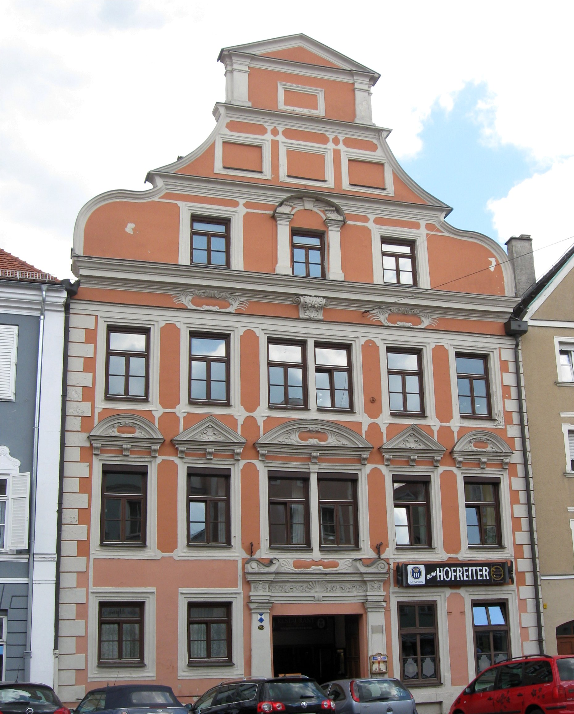 Neustadt 505; Ehem. Adelspalais, heute Gasthof, dreigeschossiger Satteldachbau im Renaissancestil mit dreizonigem Giebel, letztes Viertel 17. Jahrhundert. D-2-61-000-404